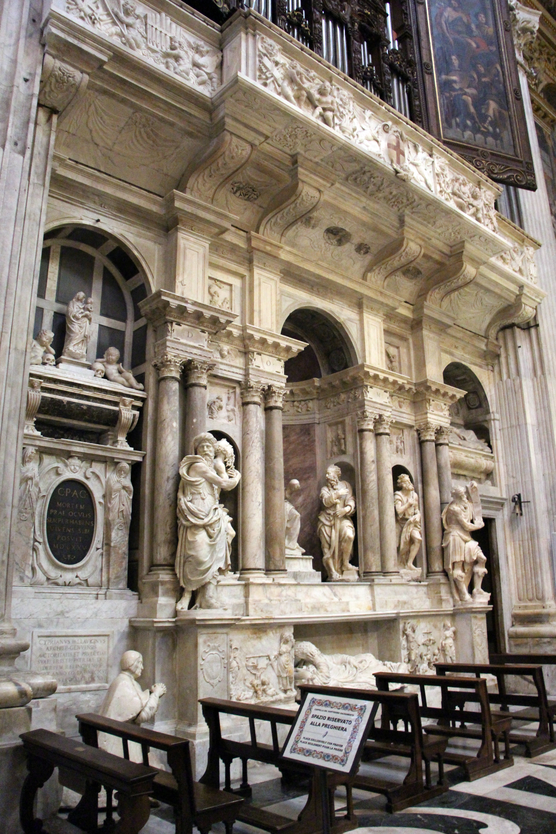 San Lorenzo (Genova)